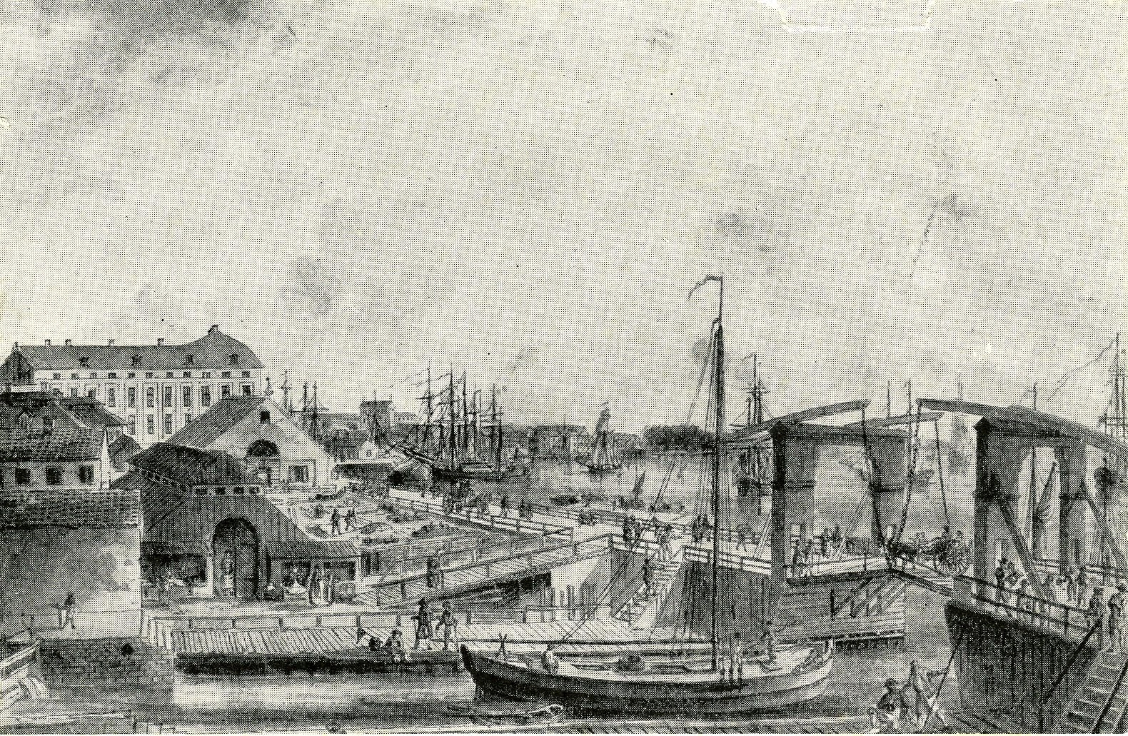 Mälarjakt i Stockholms sluss